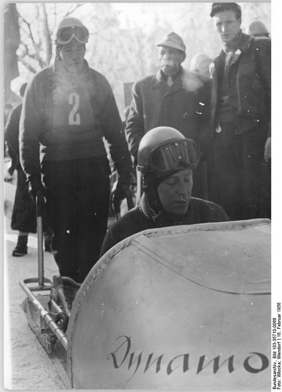 Oskar Winkler, Werner Geinitz Zentralbild Wlocka-Wendorf 16.2.56 VII Wintersportmeisterschaften der DDR in Oberhof Am 16.2.1956 fand in den Vormittagsstunden der erste Vorlauf zur DDR-Meisterschaft im Zweier-Bob auf der Wadebergbobbahn statt. UBz: Die Mannschaft der SG Dynamo Zinnwald Oskar Winkler (rechts) und sein Bremser Werner Geinitz beim Start.